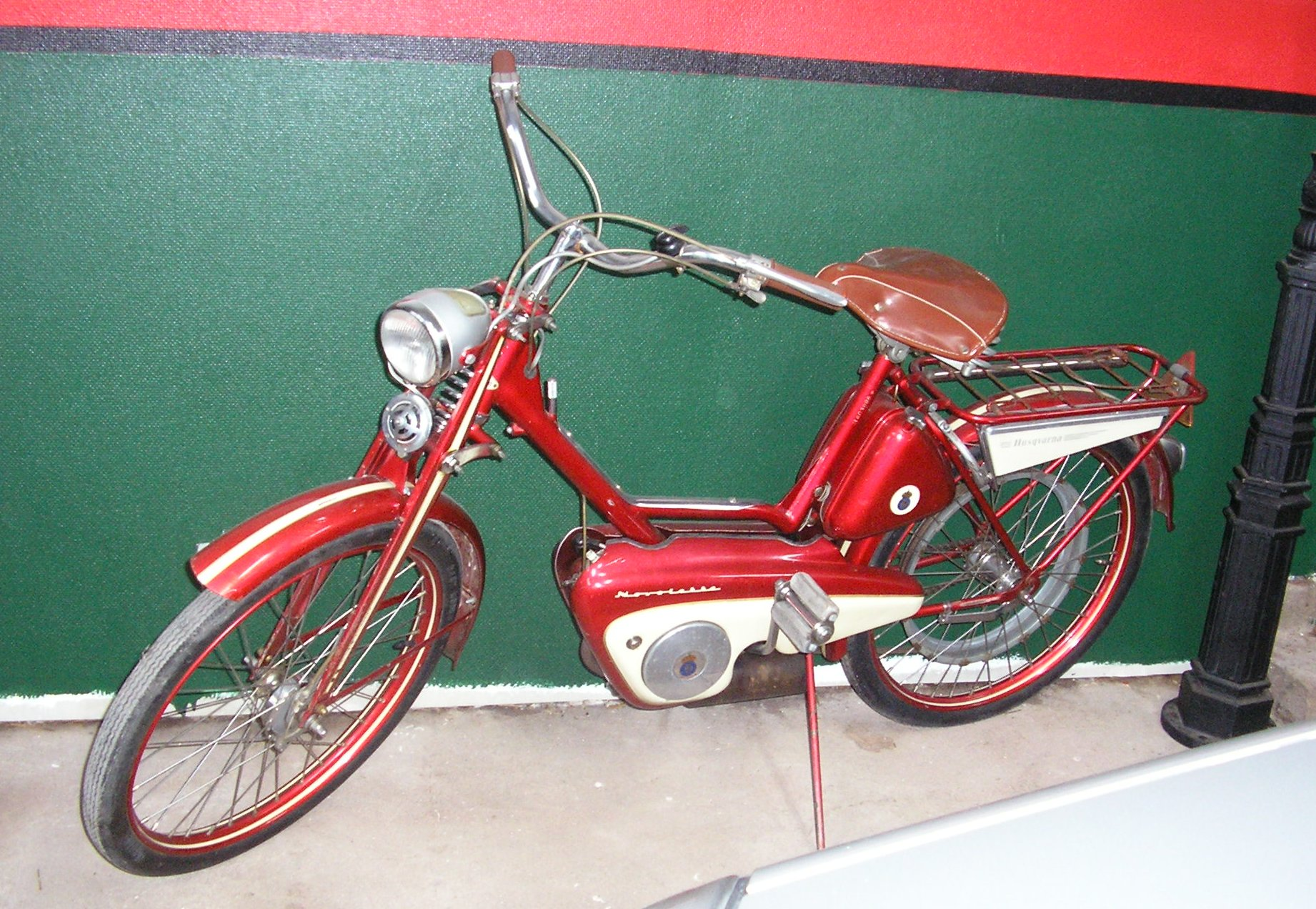 Husqvarna Novolette moped.